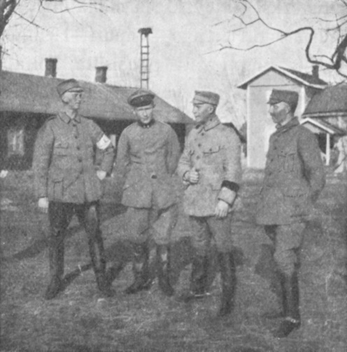 Description